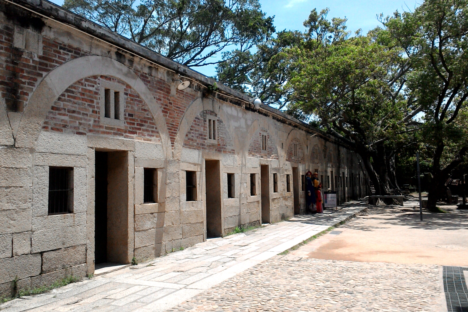 胡里山炮台西營房,福建省廈門市思明區濱海街道白城社區